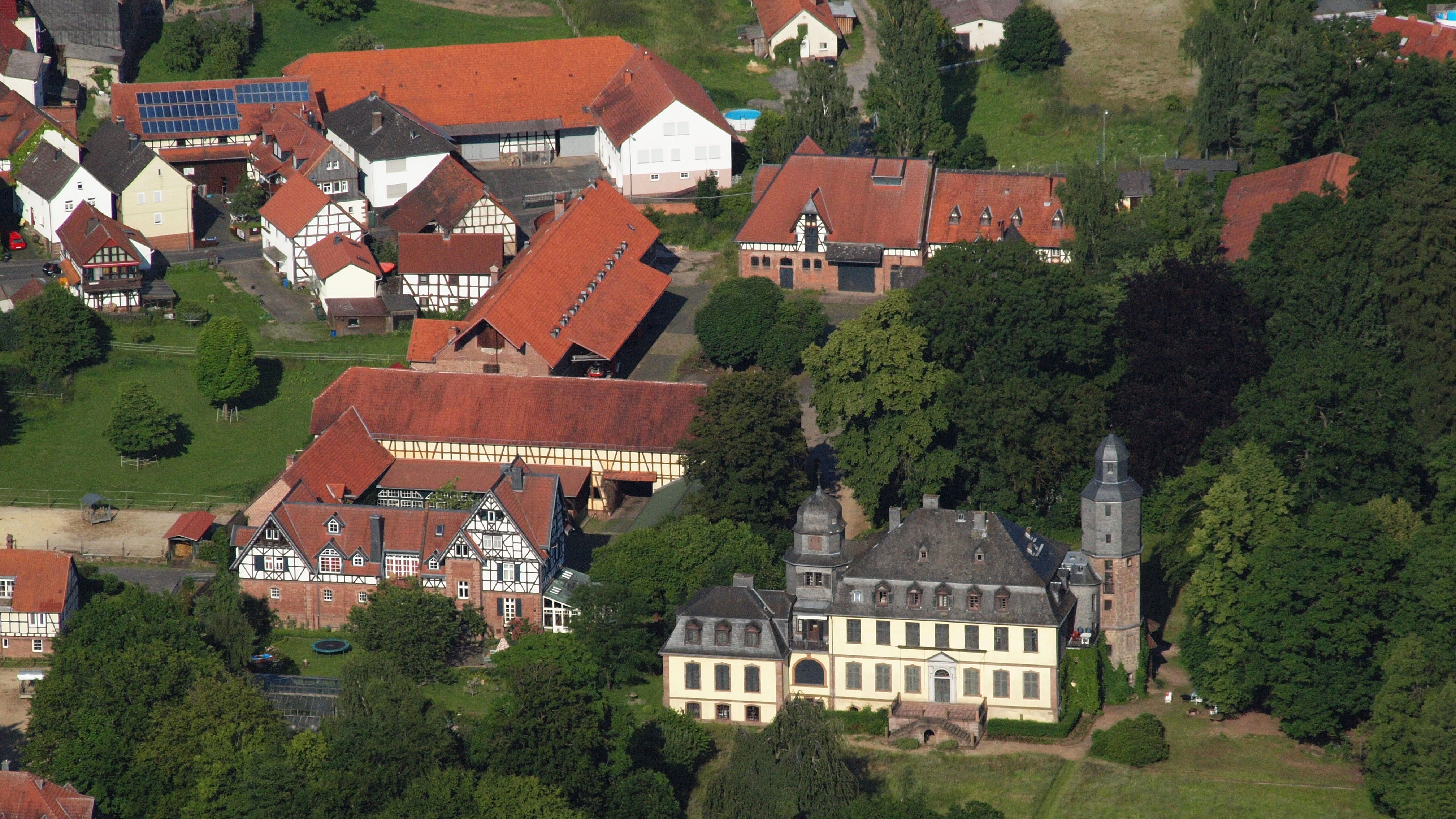 Burg Schönstadt, Schönstadt, Cölbe: Luftaufnahme